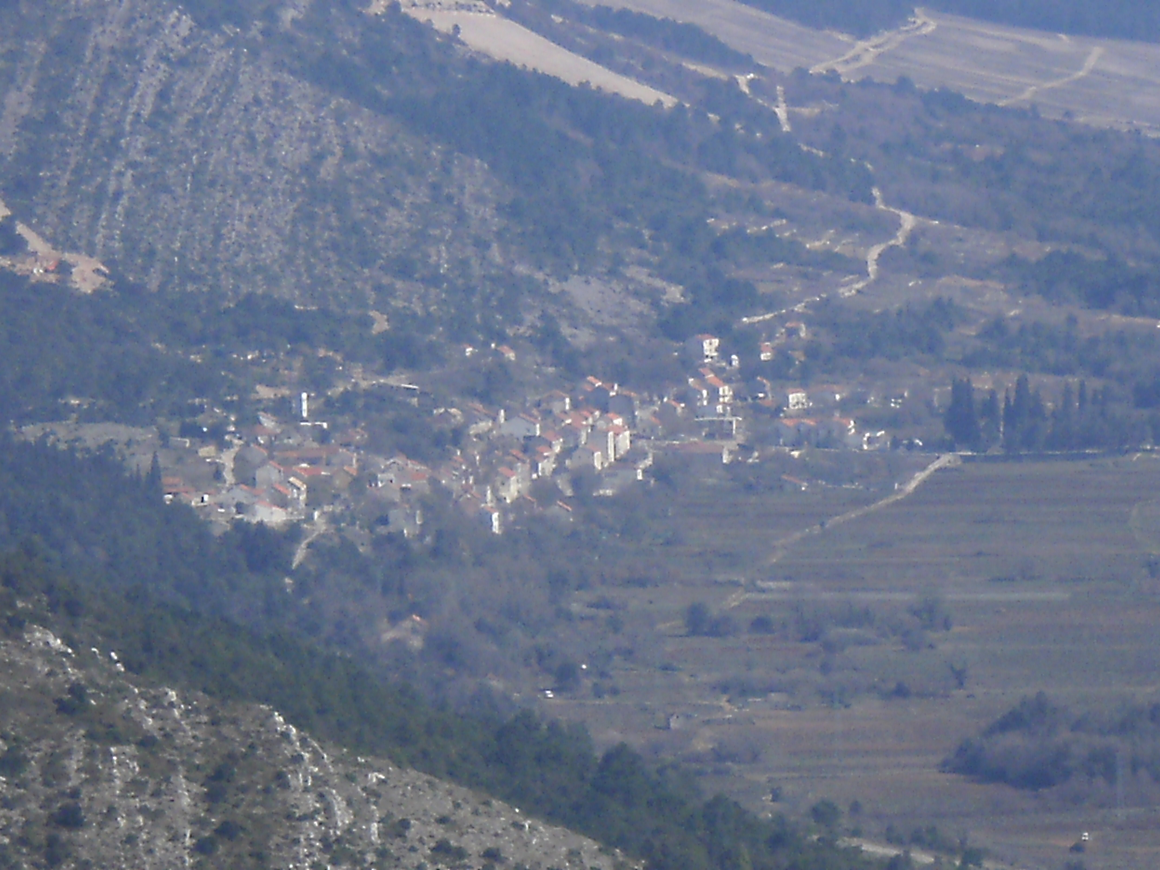 Kuna peliška gledana sa Vitere